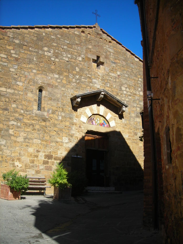 La facciata della Pieve della S.S. Annunziata in Montisi, provincia di Siena, semicoperta da un'ombra.